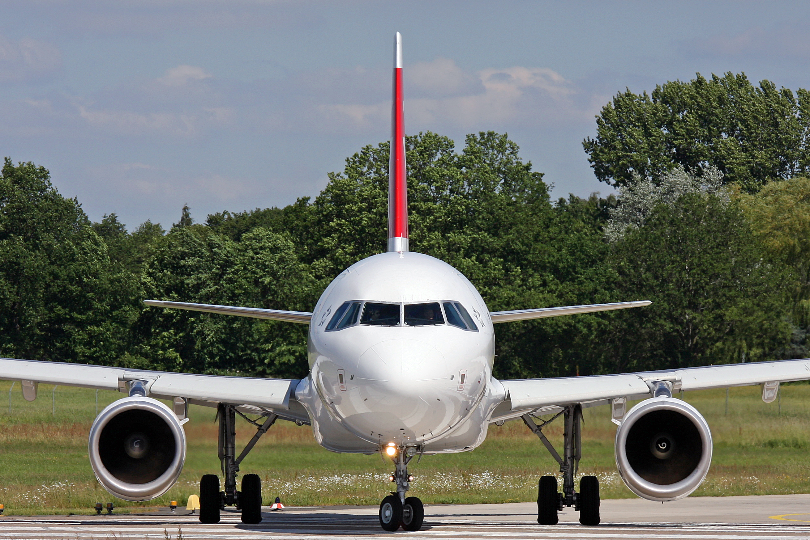 IMG_9117 X